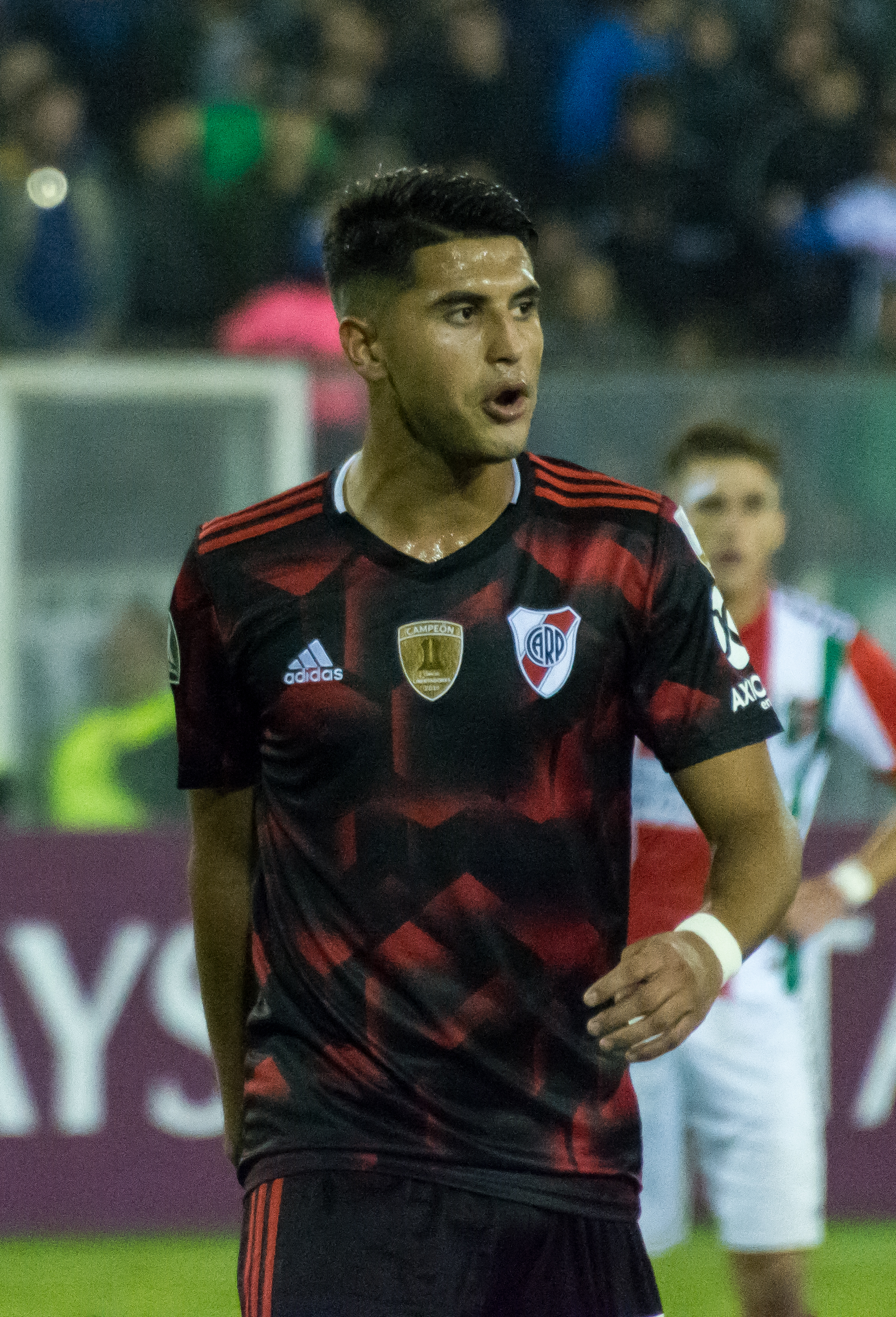 Palestino v River Plate, Estadio Monumental, Macul, Santiago, Región Metropolitana, Chile.